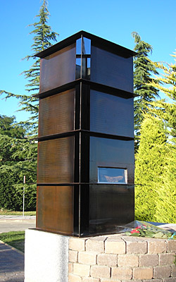 Monumento en homenaje a las víctimas de la explosión del polvorín de Peñaranda de Bracamonte ocurrida el 9 de julio de 1939.